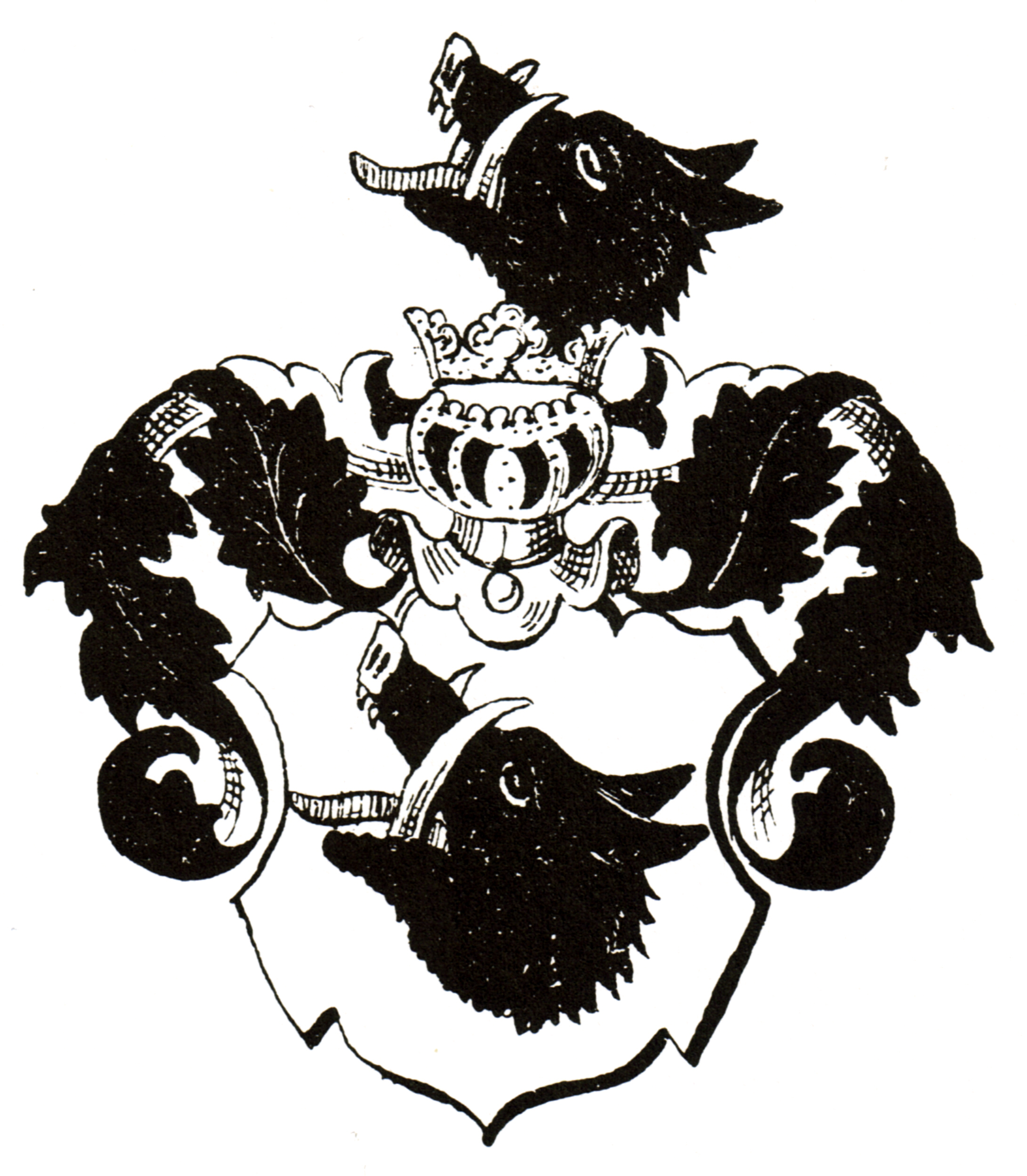 Originalwappen des Adelsgeschlecht derer von Qualen